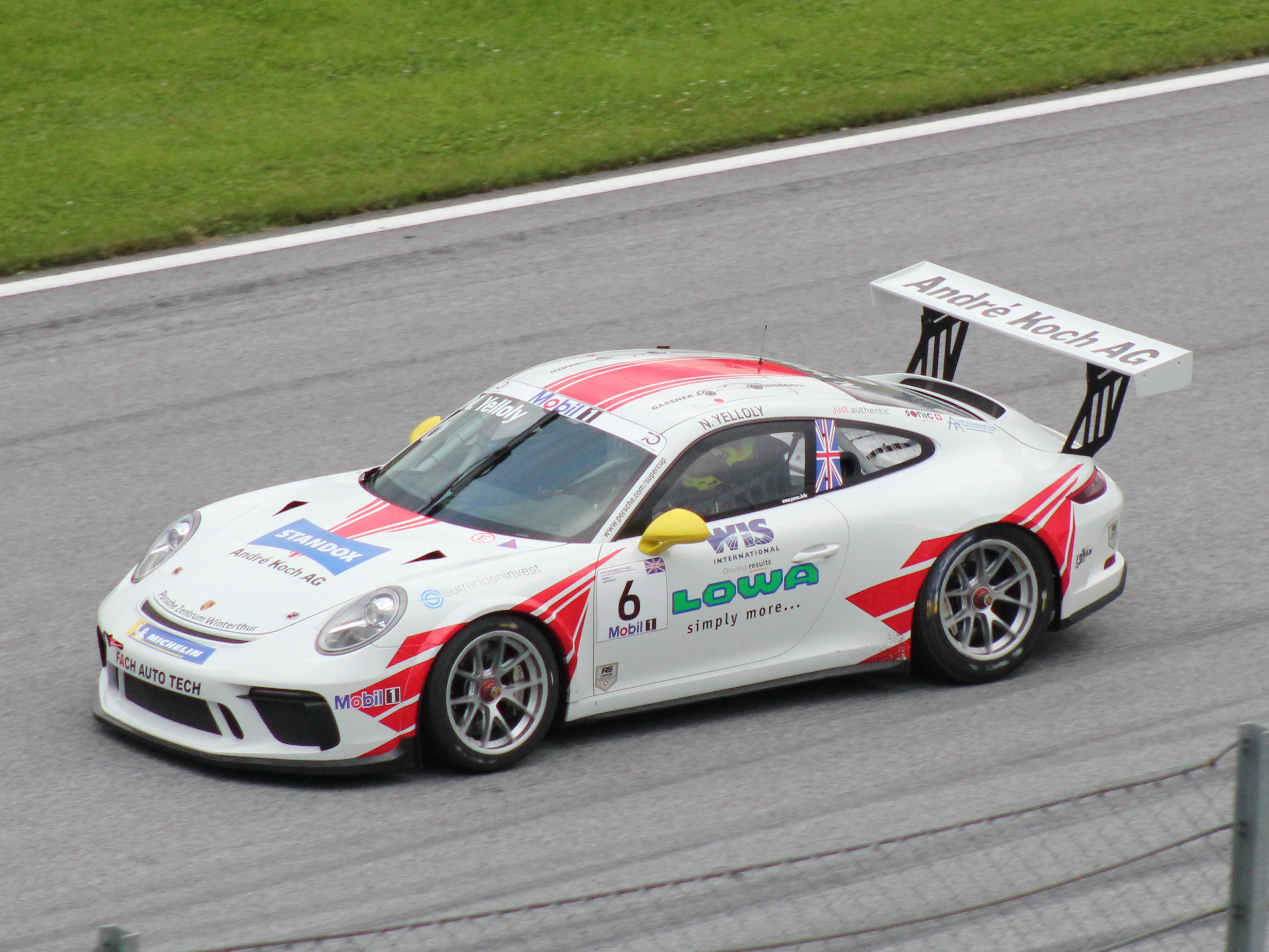 6 Nick Yelloly beim Rennwochenende in Österreich 2018